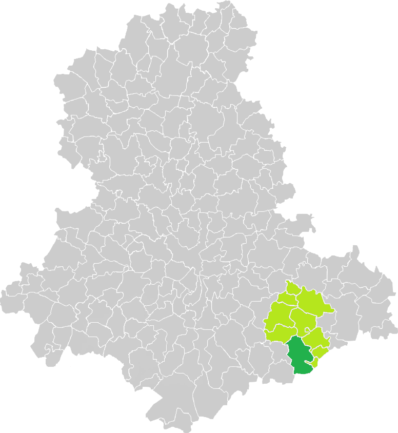 Carte de situation de la commune de La Croisille-sur-Briance (en vert foncé) dans le votre Canton (en vert clair) sur une carte des communes de la Haute-Vienne